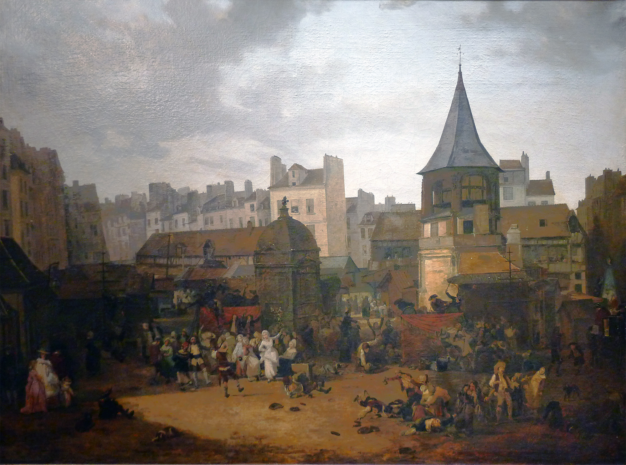 Tableau de Philibert-Louis Debucourt : Réjouissances données par la Ville de Paris aux Halles, le 21 janvier 1782, à l’occasion de la naissance du dauphin.